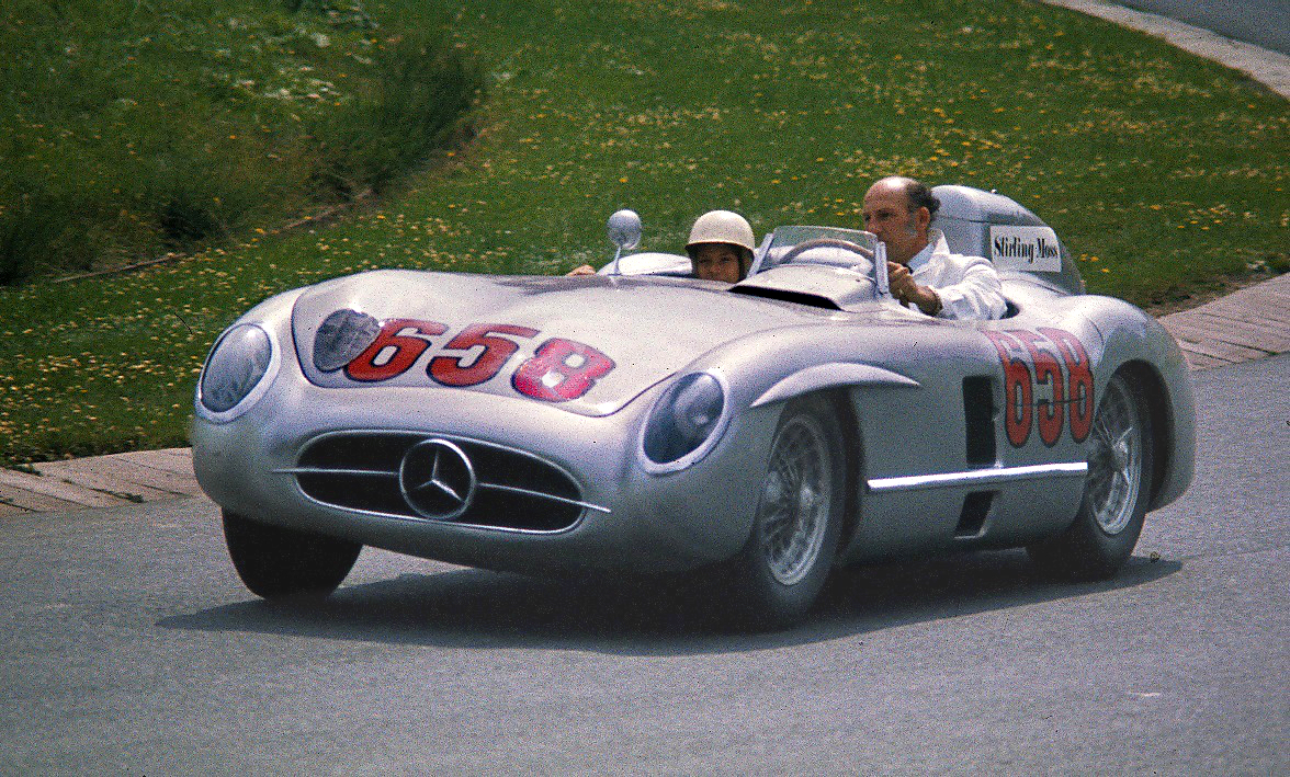 Stirling Moss mit Fahrgast im Mercedes SLR 1977 beim Oldtimer-GP des AVD auf dem Nürburgring